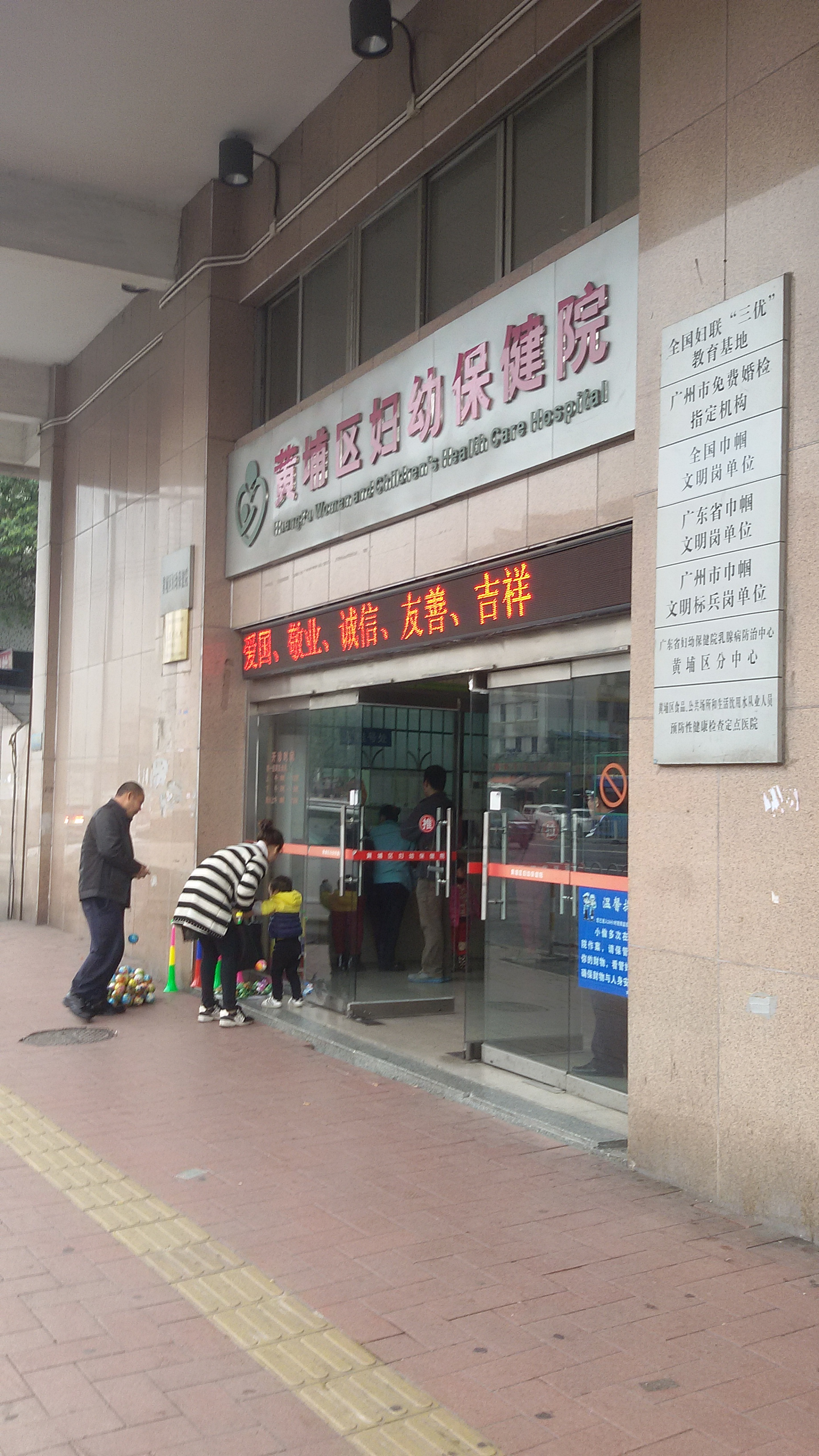 粵語: 黄埔区妇幼保健院